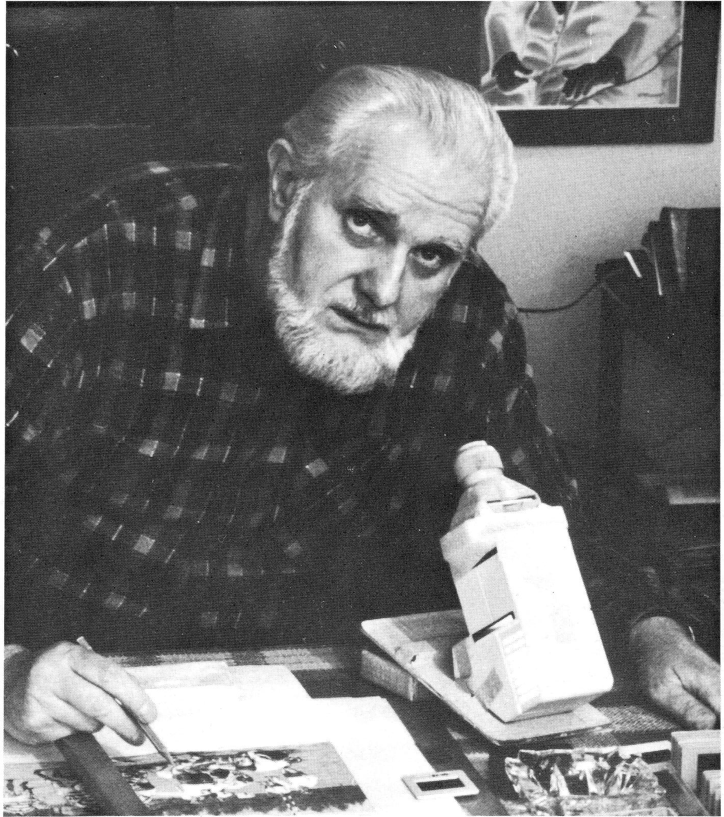 Porträt von Gerdt Marian Siewert